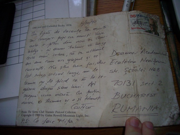 vedere trimisa catre doamna academician Ecaterina Ciorǎnescu-Nenițescu